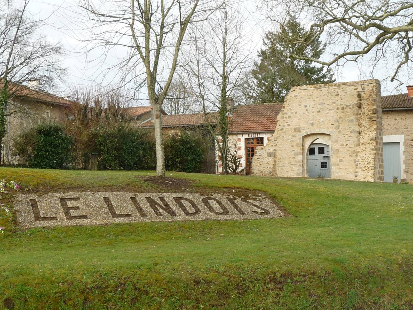 Le Lindois, Charente, France